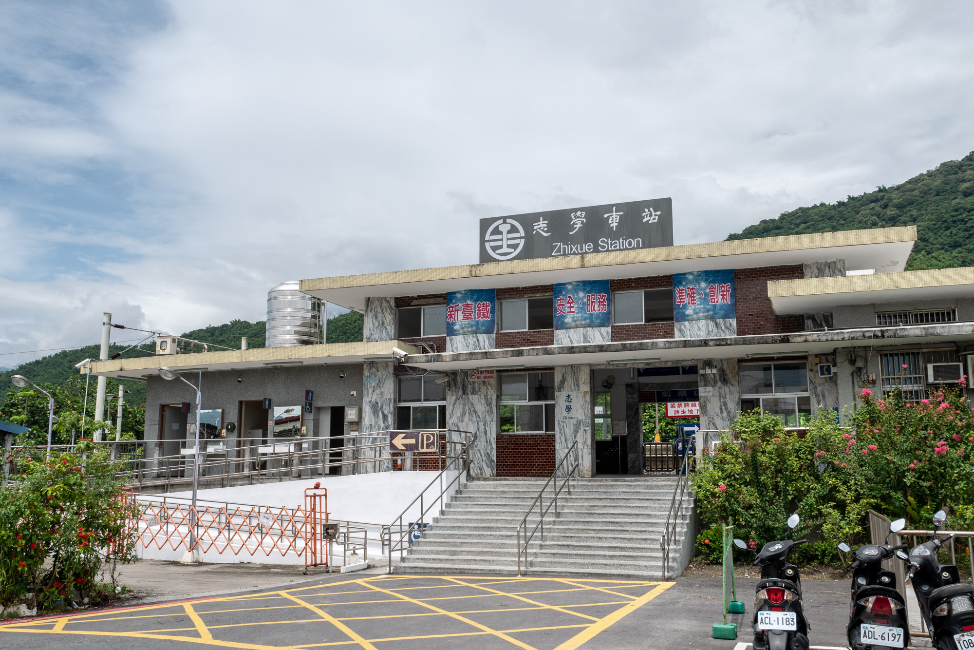 臺灣鐵路管理局志學車站2018年改建後樣貌。